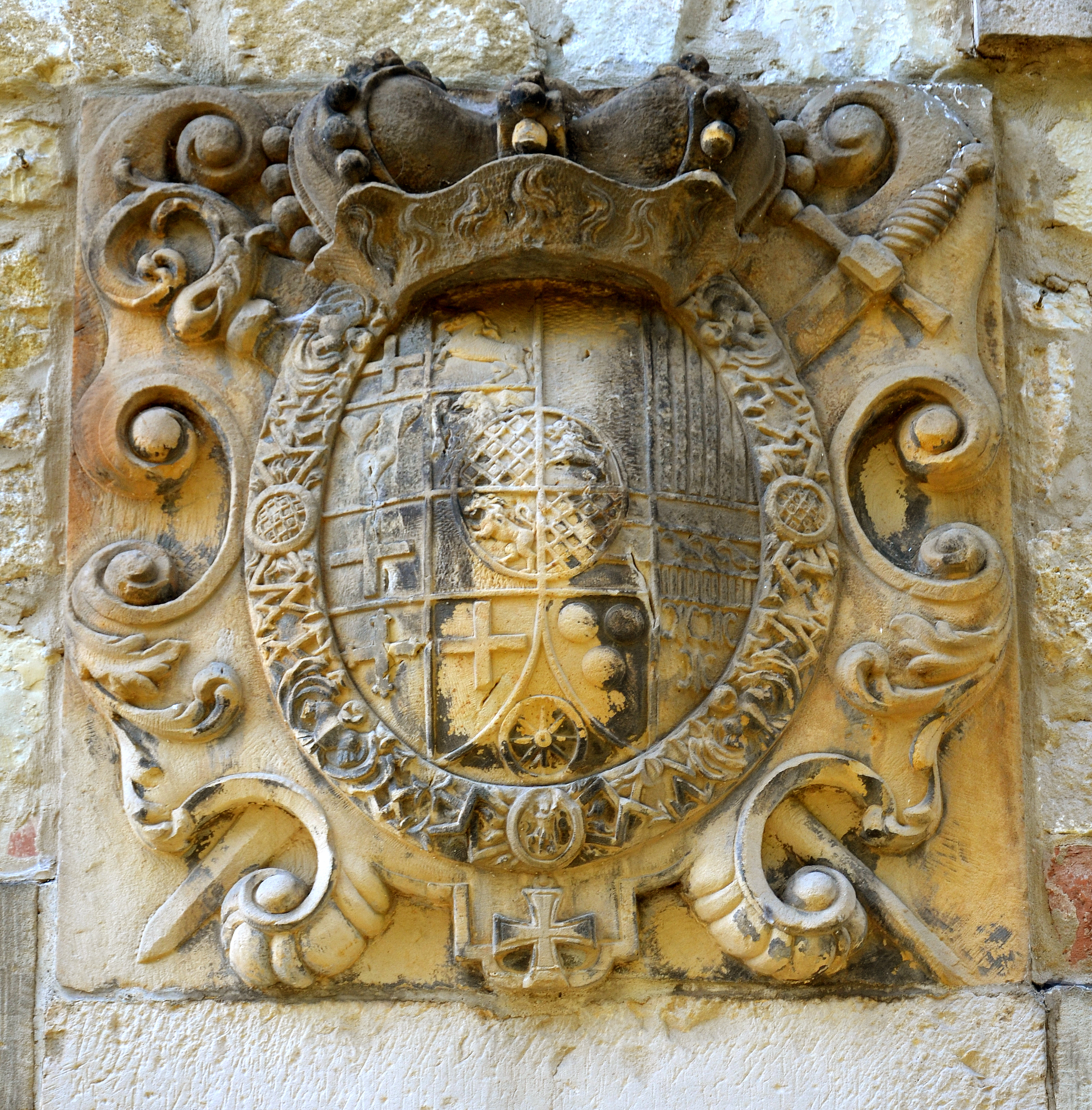 Mitte des 18. Jahrhunderts im ehemaligen Brauhaus in Ruthe nachträglich eingefügter Wappenstein des Fürstbischofs von Hildesheim Clemens August von Bayern ...